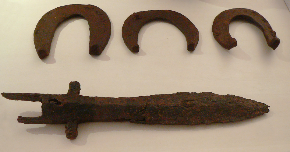 Lanzenspitze und Hufeisen als Funde von Hus Aren, ausgestellt im Museum Bückeburg